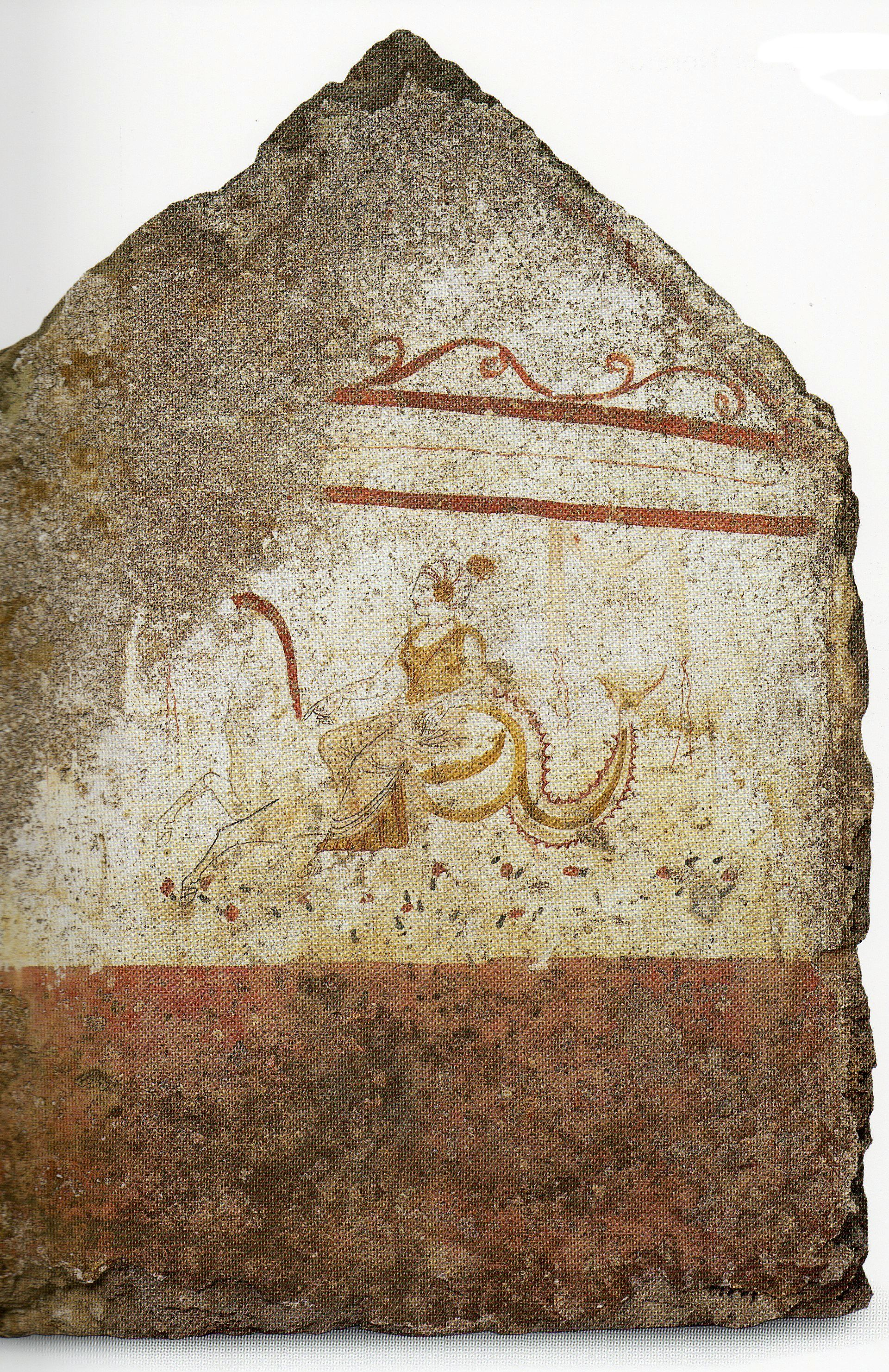 Paestum, Grab der Nereide. Detail